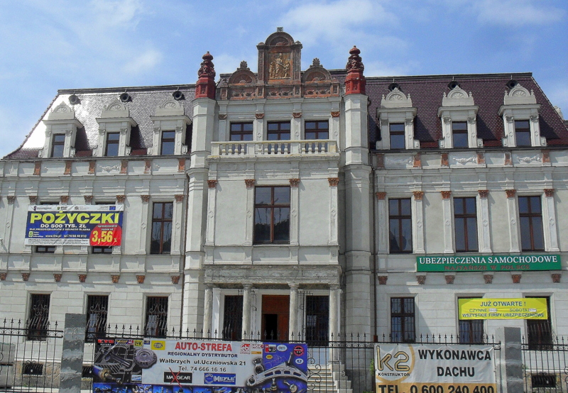 Wałbrzych, pałac Tielscha, 1860, pocz. XX